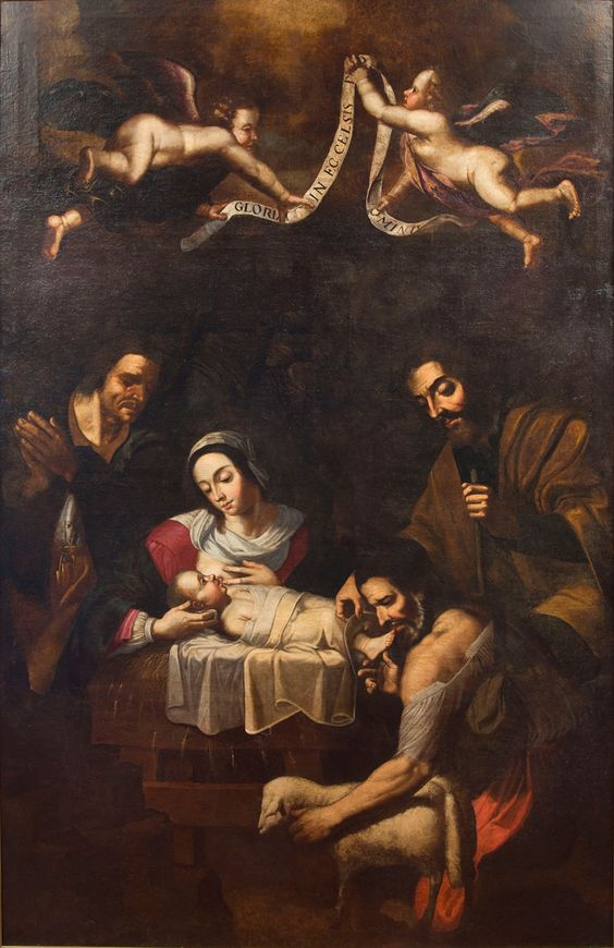 L'obra forma part del retaule major de l'església del Carme de Manresa.